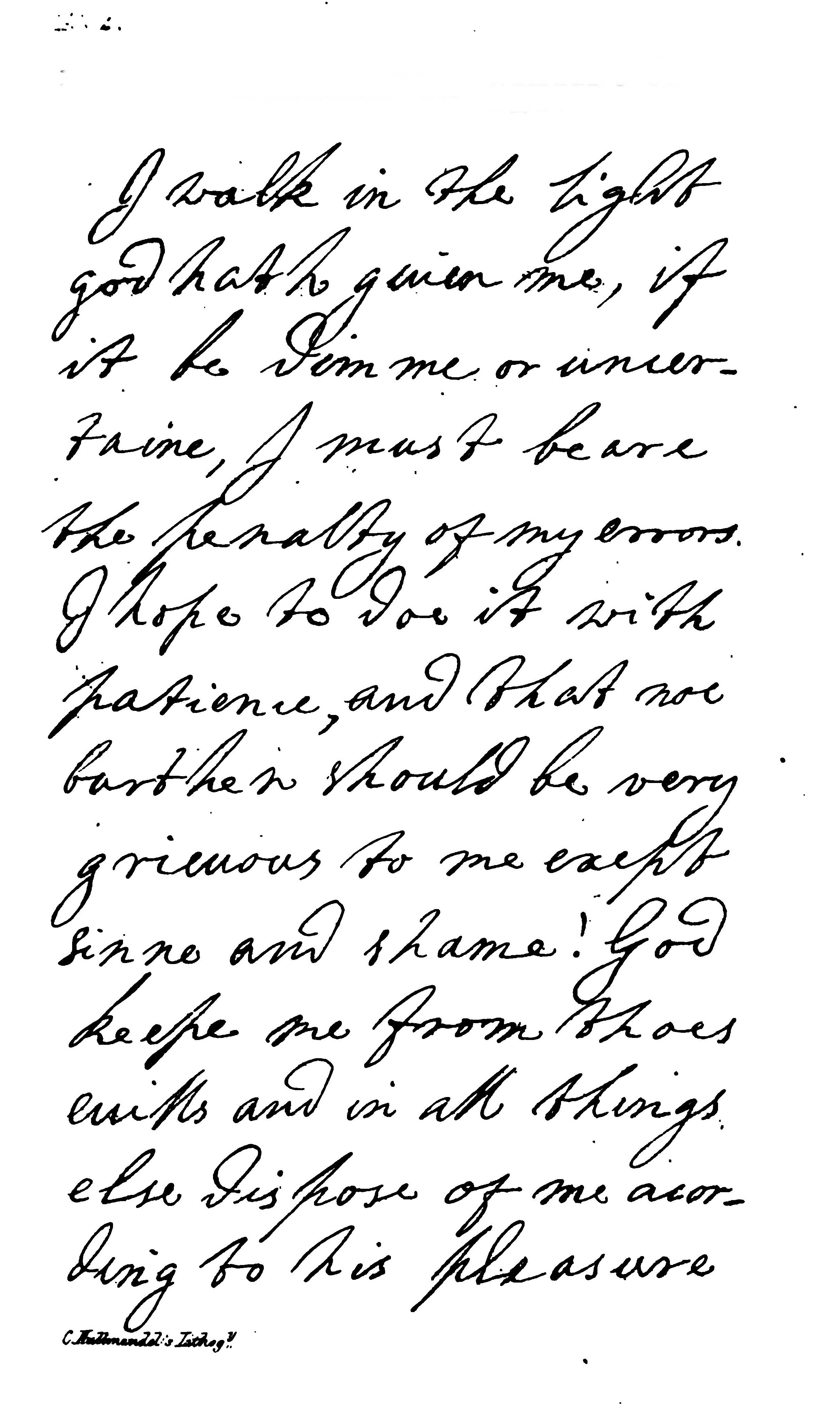 AlgernonSidney (1622-1683)